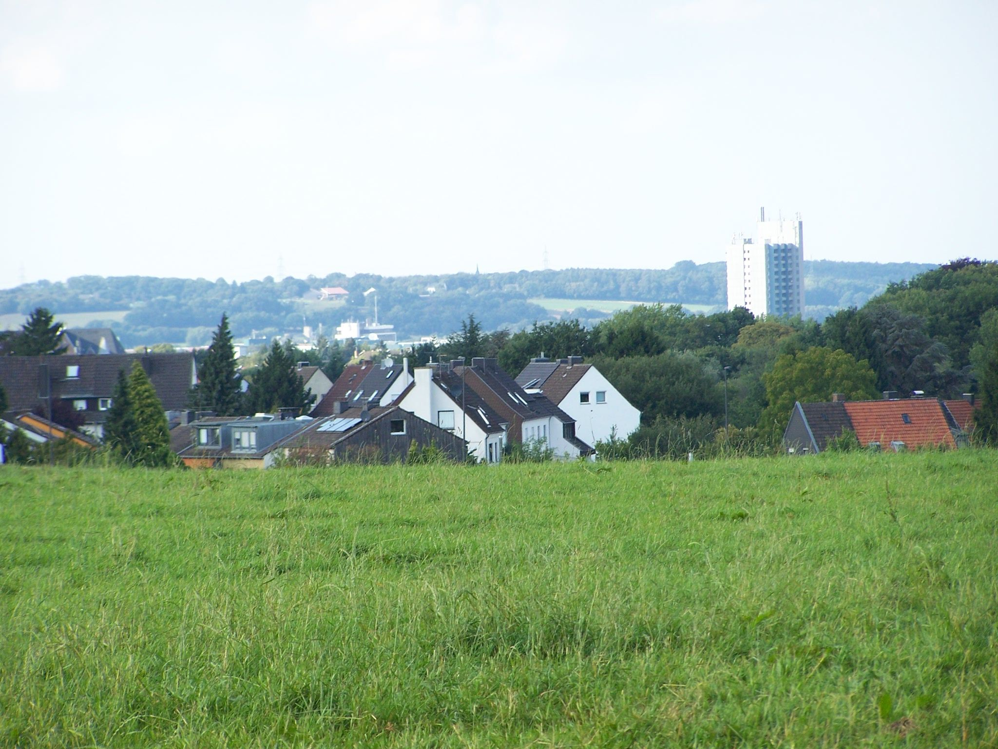 Blick über die Beverau zum Hochhaus am Europaplatz